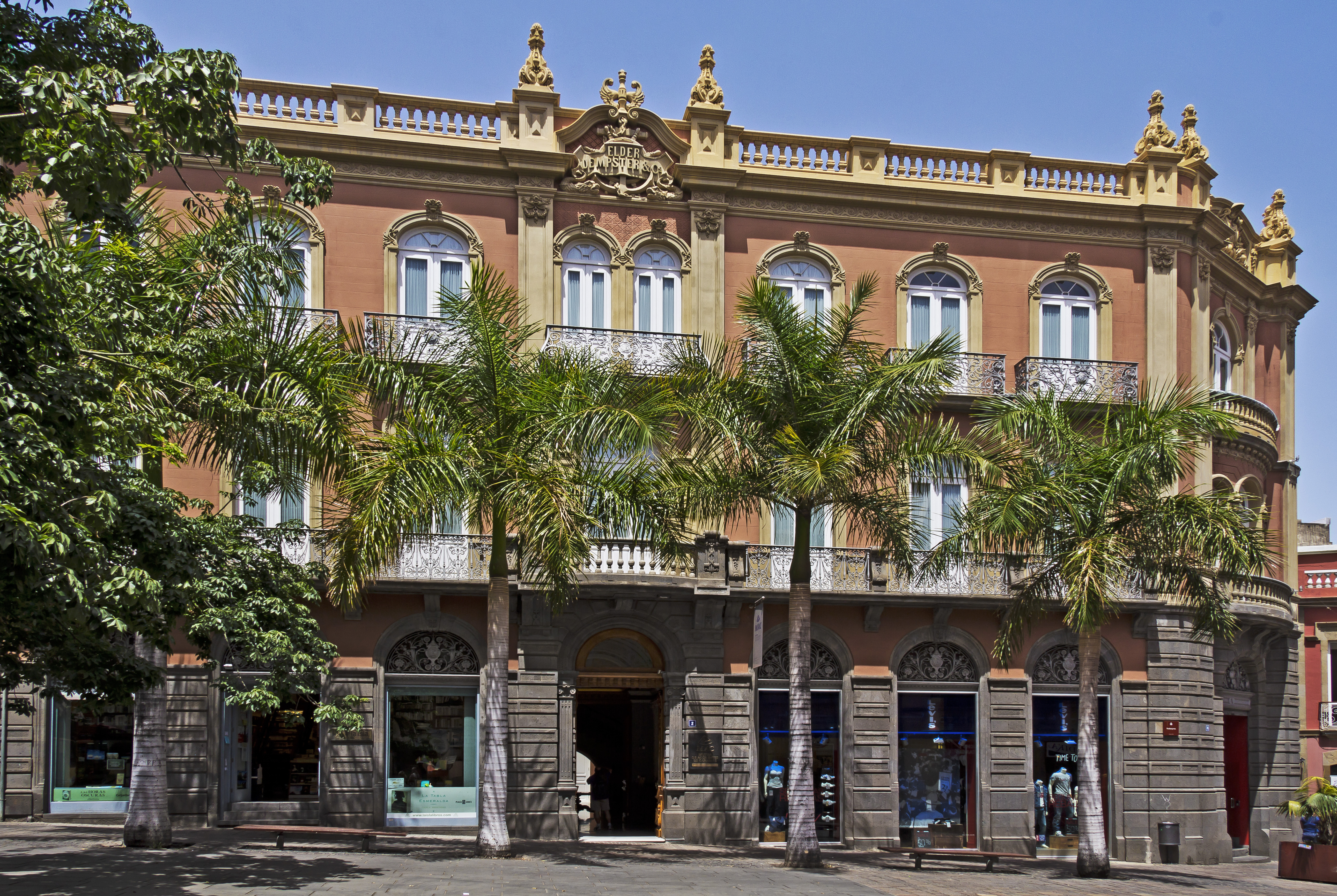 Das Edificio Elder wurde in den Jahren 1903 bis 1905 im oberen Teil der Calle Castilo in Santa Cruz de Tenerife errichtet. Der Architekt war Antonio Pintor y Ocete. Das Gebäude wurde von der Reederei Elder, Dempster & Cia. in Auftrag gegeben.